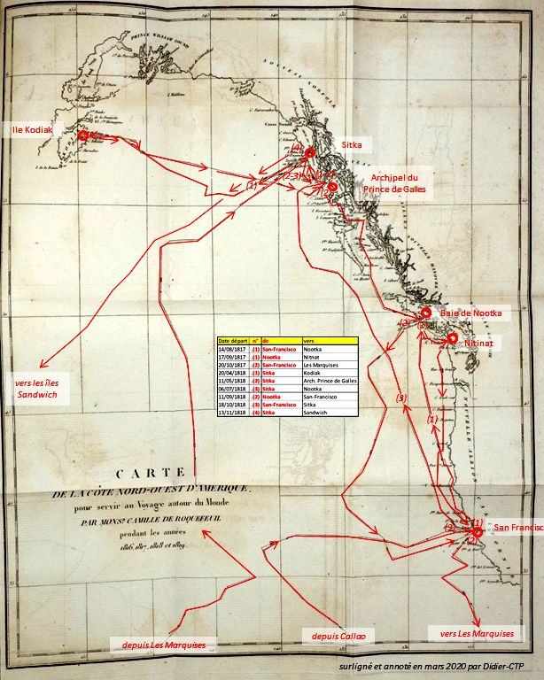 figure extraite du Journal d'un voyage autour du monde, par Camille de Roquefeuil, 1823